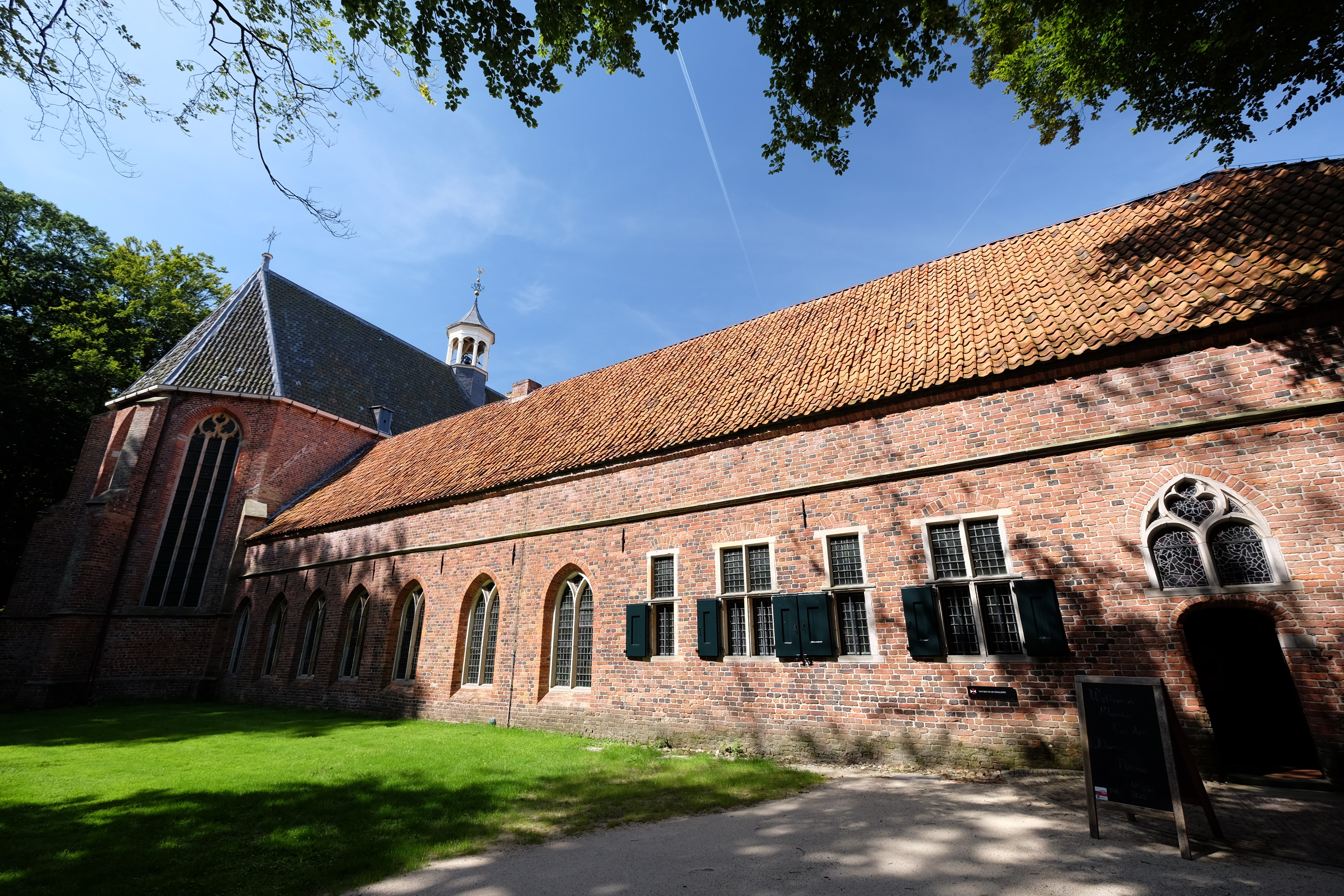 9561 Ter Apel, Netherlands